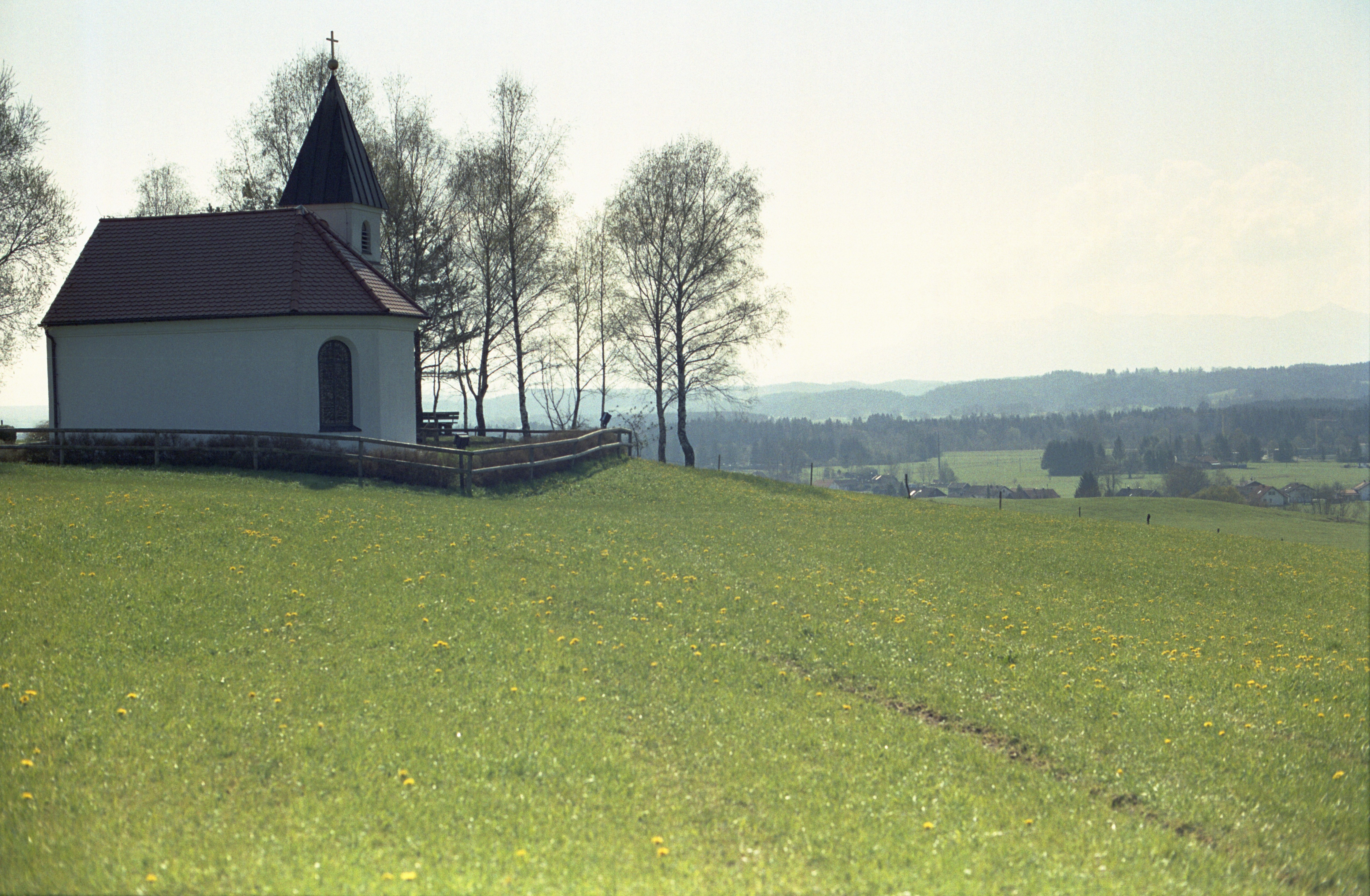 Knappenkapelle auf der Bergehalde Peißenberg